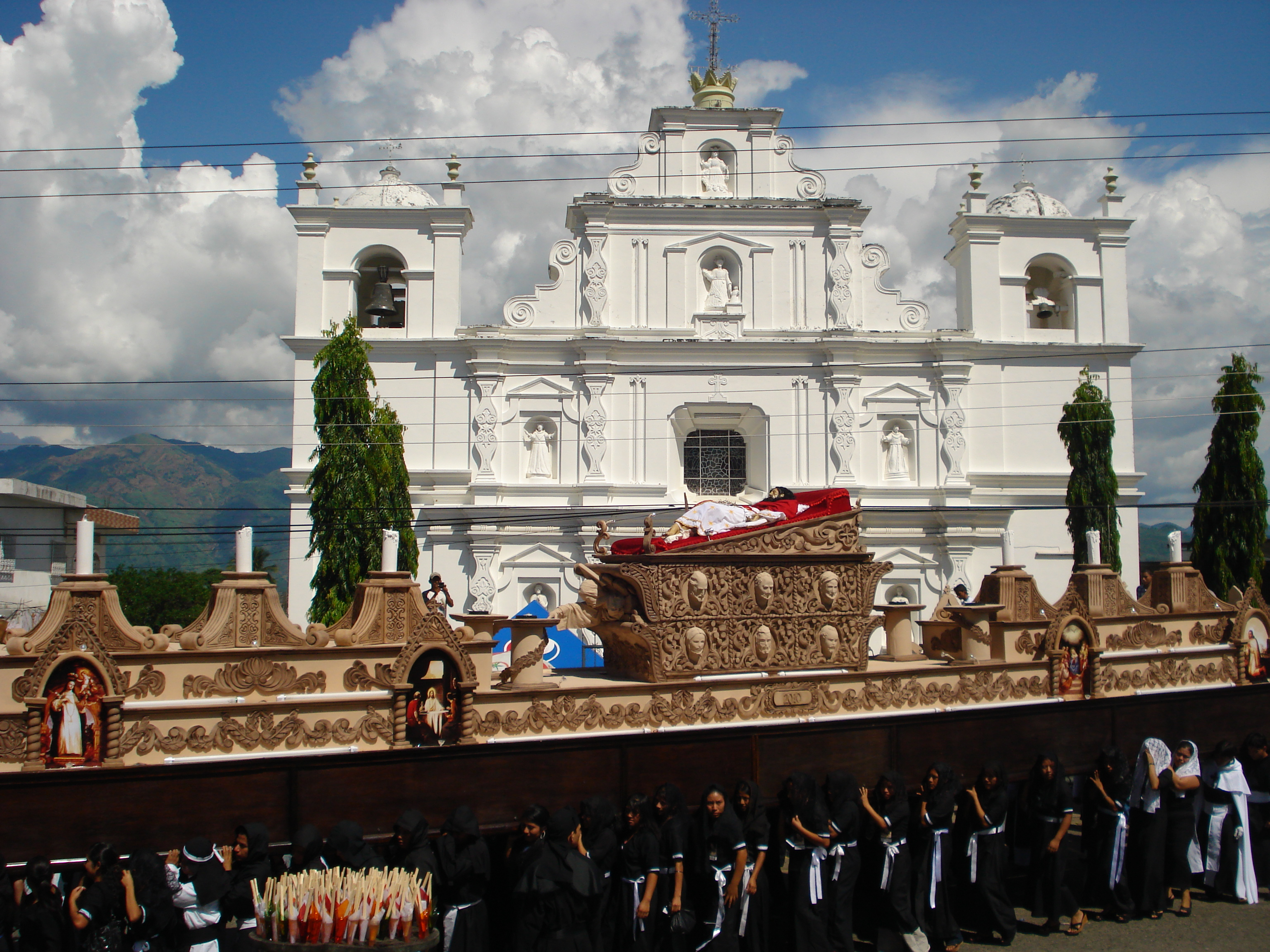 Señor Sepultado saliendo de la Iglesia Parroquial de Chiquimula.